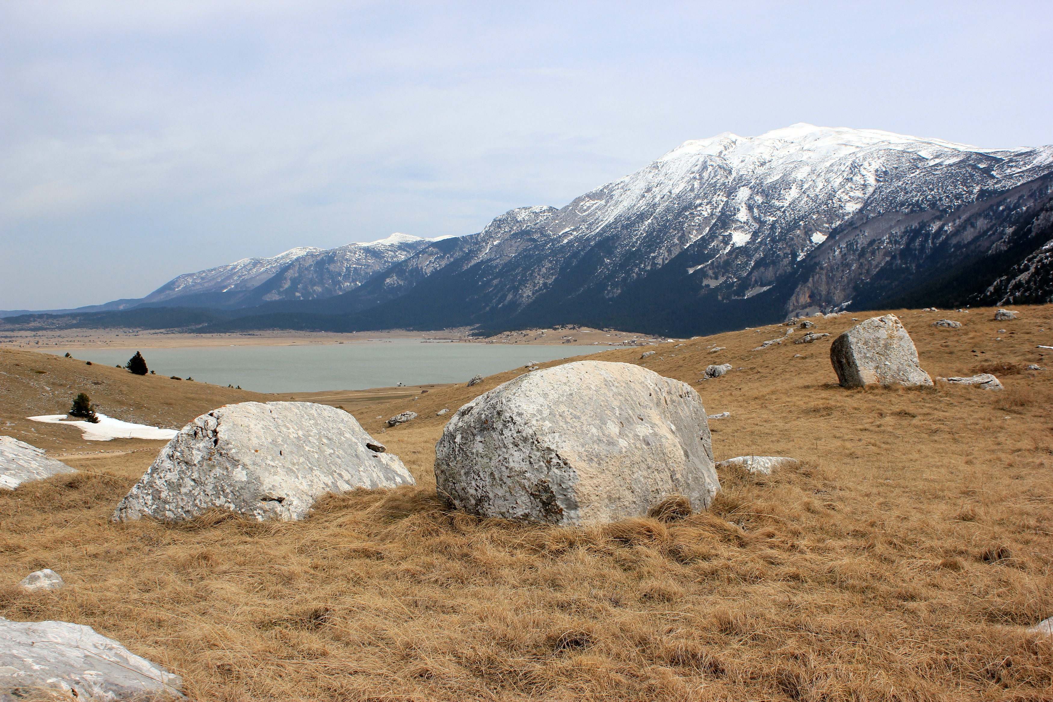 Der See Blidinjsko jezero und das Gebirge Čvrsnica, Bosnien und Herzegowina.